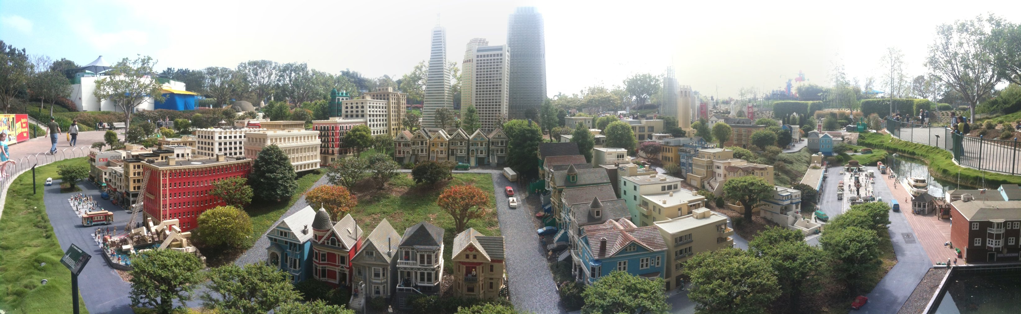 San Francisco at Legoland California (Panorama)